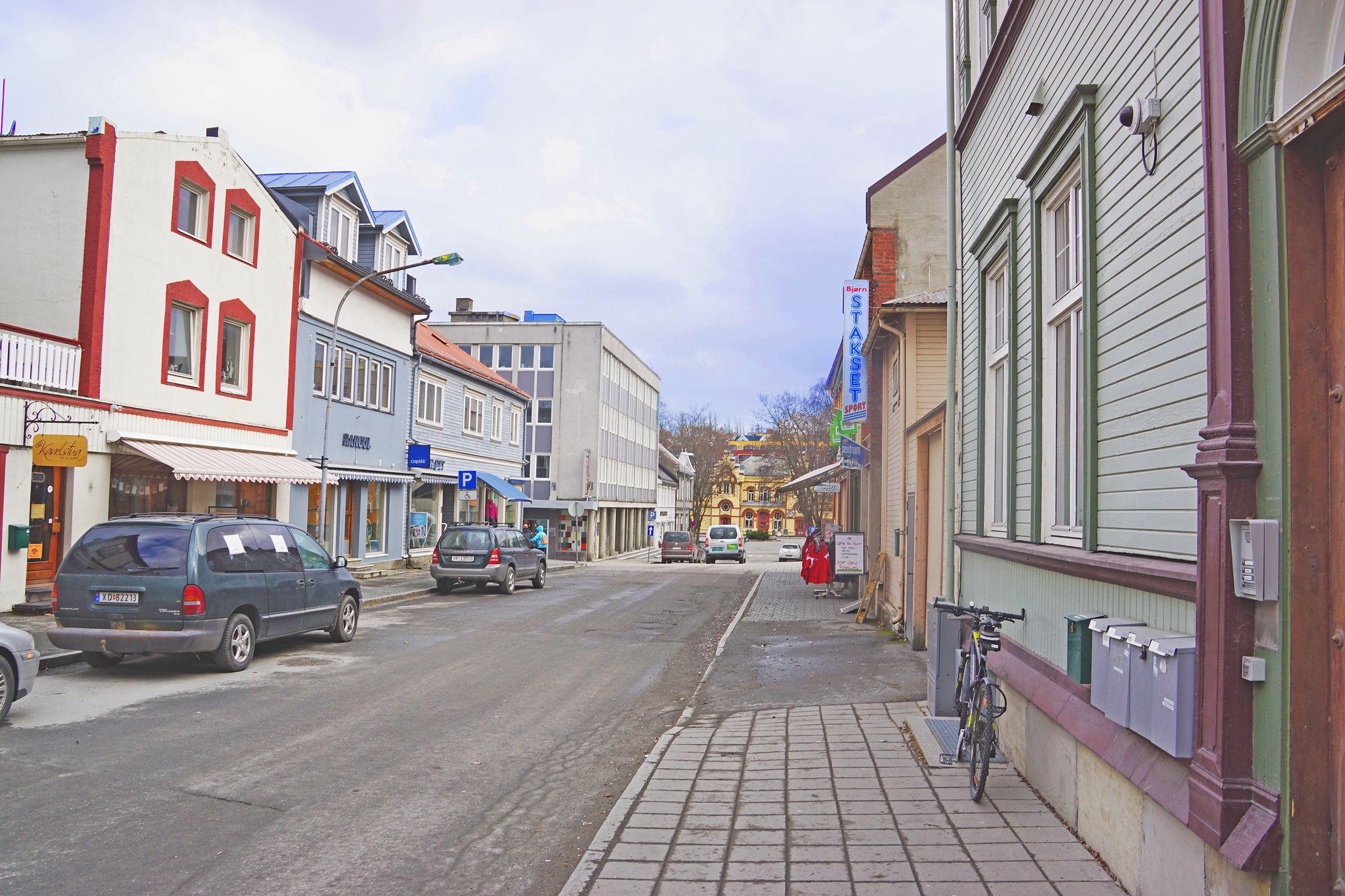 Sverres gate i Levanger mot jernbanestasjonen, 13. mars 2014.